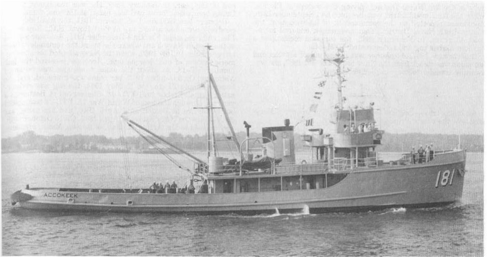 USS Accokeek (ATA-181)